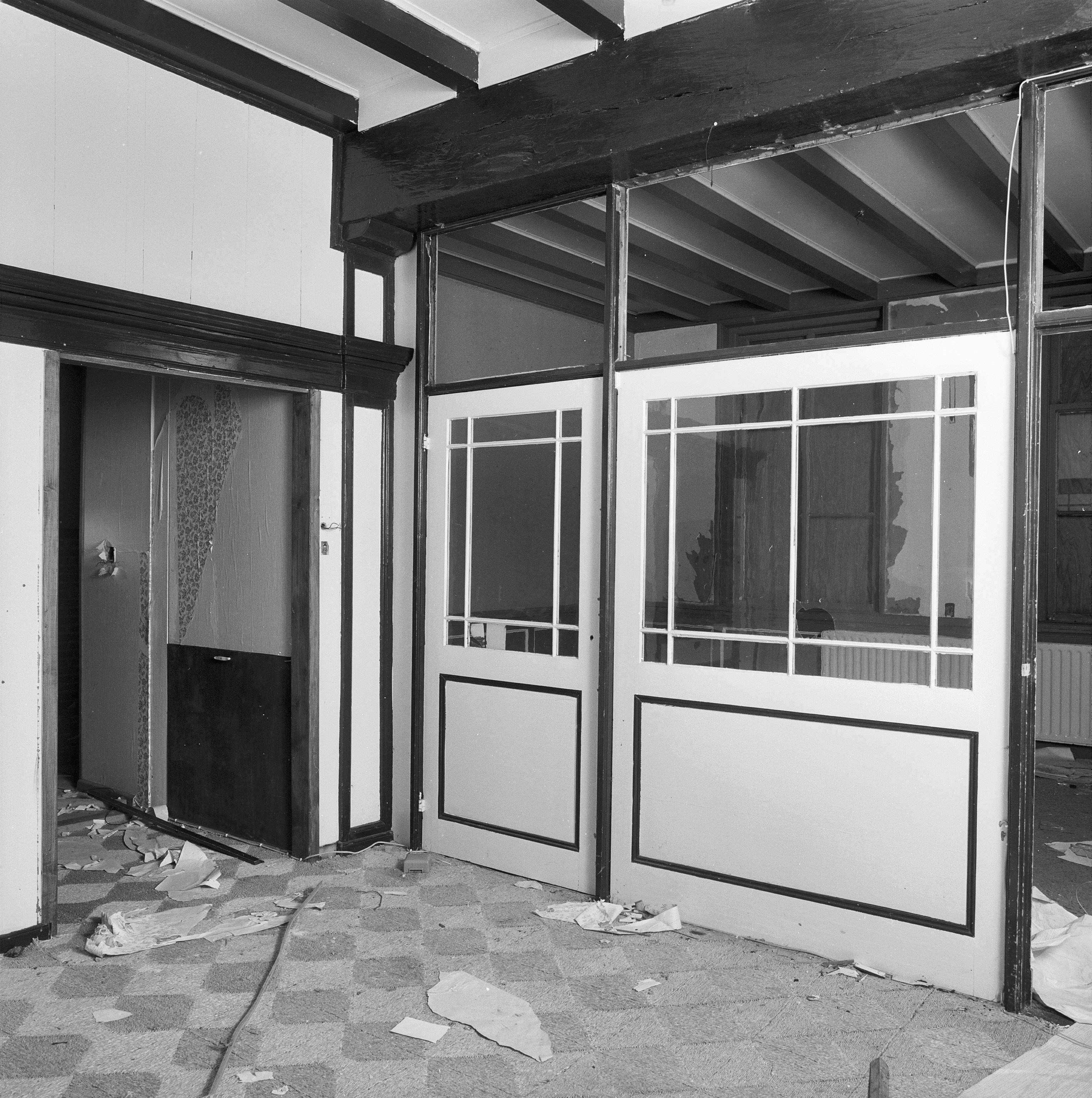 INTERIEUR, SCHEIDINGSWAND VOORHUIS